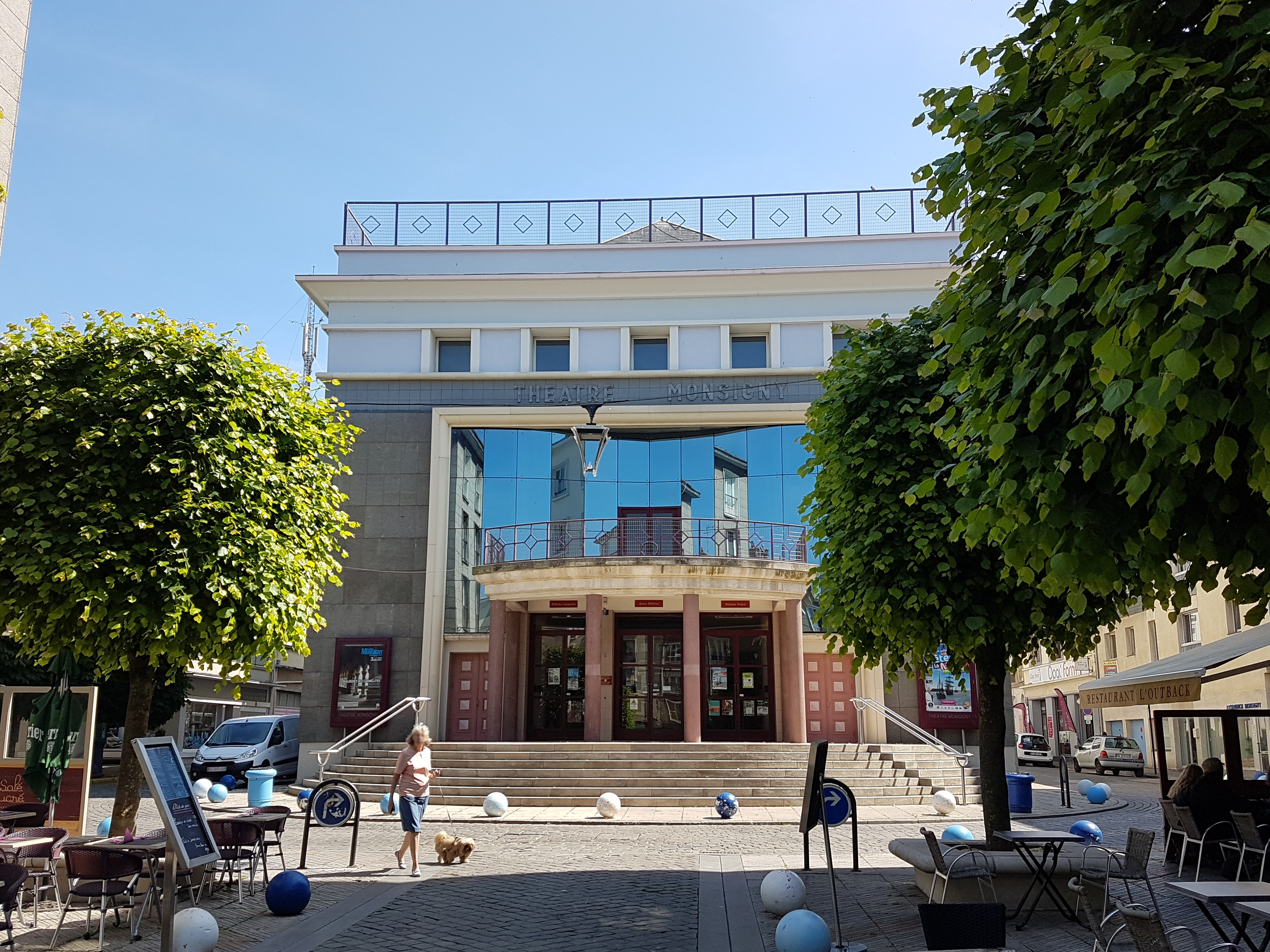 Le Théâtre Monsigny à Boulogne-sur-Mer (Pas-de-Calais)